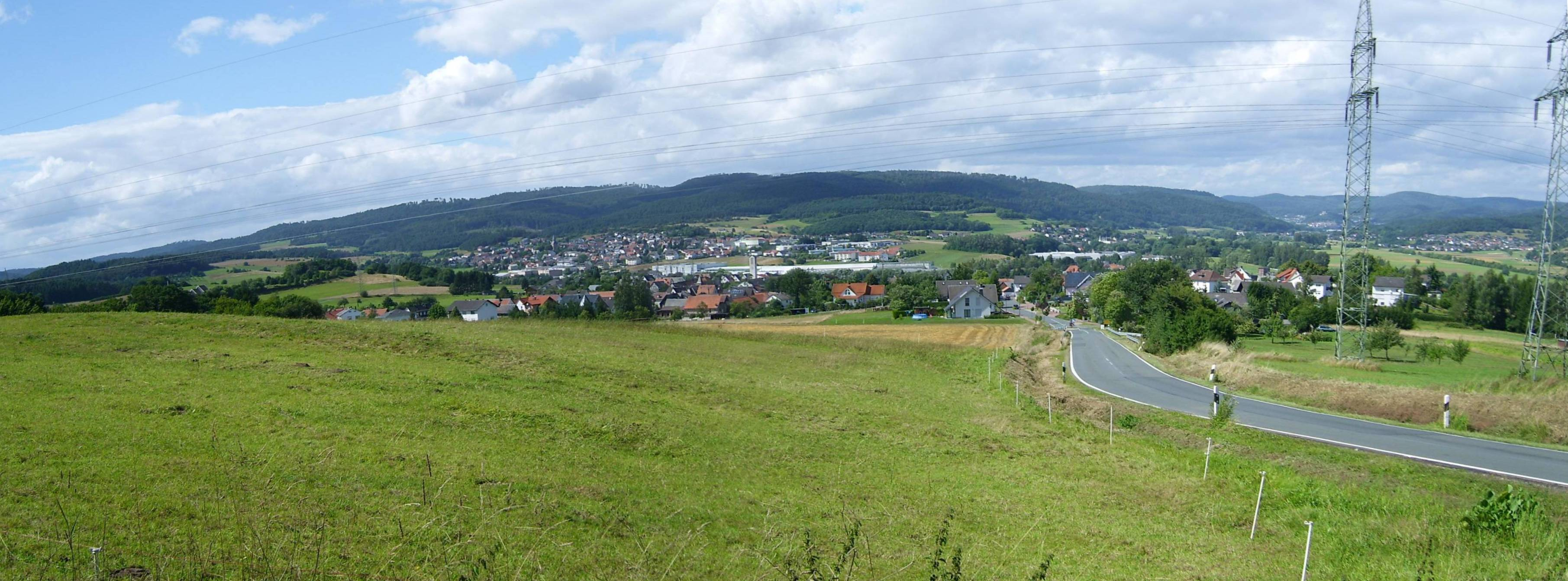 Blick vom Sattel zwischen Eichelhardt (465m, Damshäuser Kuppen) und Kronenberg auf den 533m hohen Schwarzenberg-Ableger Nimerich und auf Friedensdorf. Rechts im Hintergrund Biedenkopf und der 631m hohe Sackpfeifen-Ableger Hainpracht, vorne rechts zwei 100-kV-Leitungen